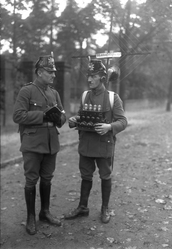 Ein Aprilscherz ! Die Berliner Schutzpolizei ist auf ihren Streifzügen mit Radioempfangsgeräten ausgerüstet worden, um bei Unruhen, Demonstrationen, wie Verbrechen usw. schnell einzuschreiten.